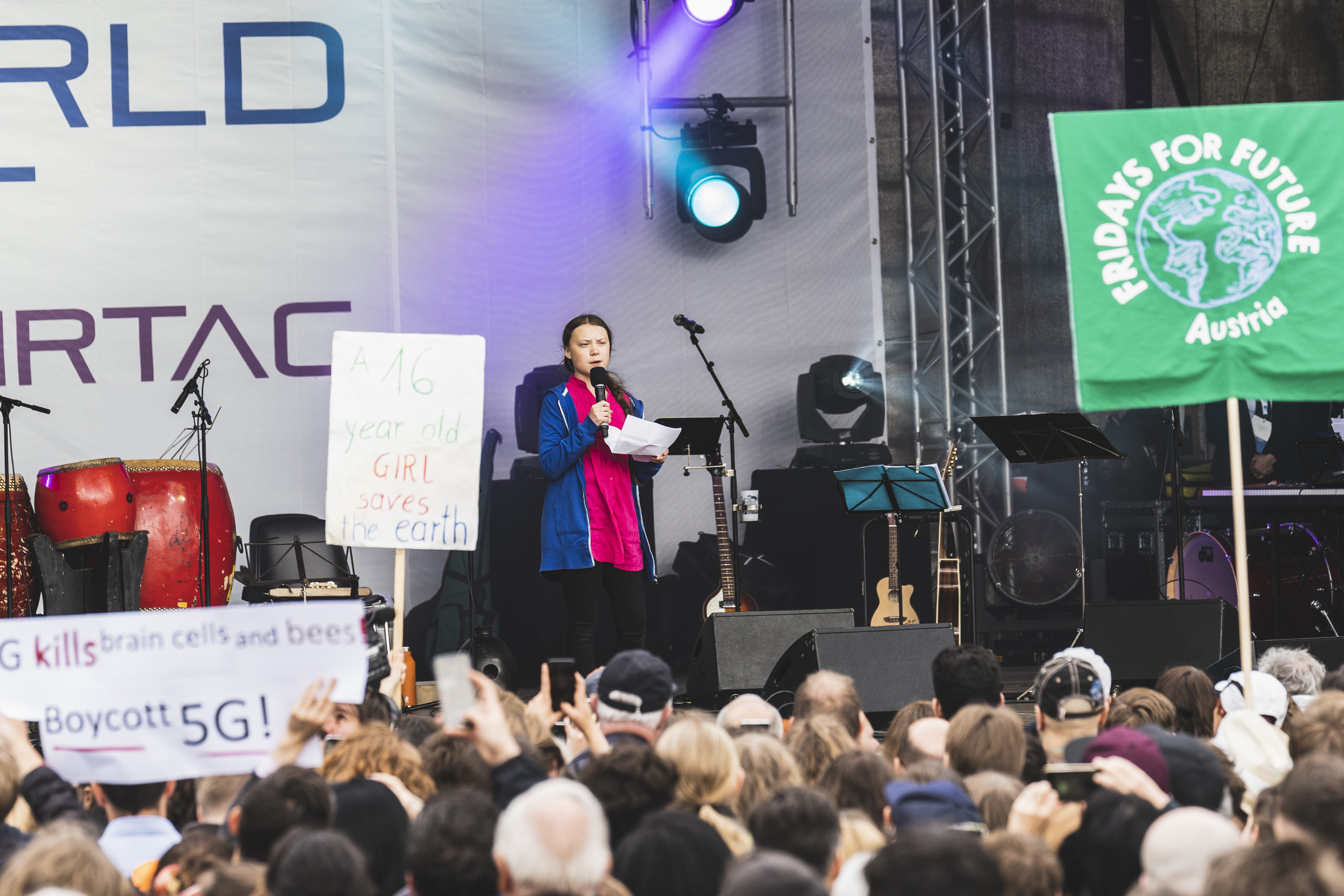 Austrian World Summit Climate Kirtag zum Anlass des R20 Austrian World Summit mit Klimaaktivistin Greta Thunberg und R20 Gründer Arnold Schwarzenegger, Ihre Botschaft: We need more Action! Am 28. Mai 2019, Wien Copyright: Eugénie Berger